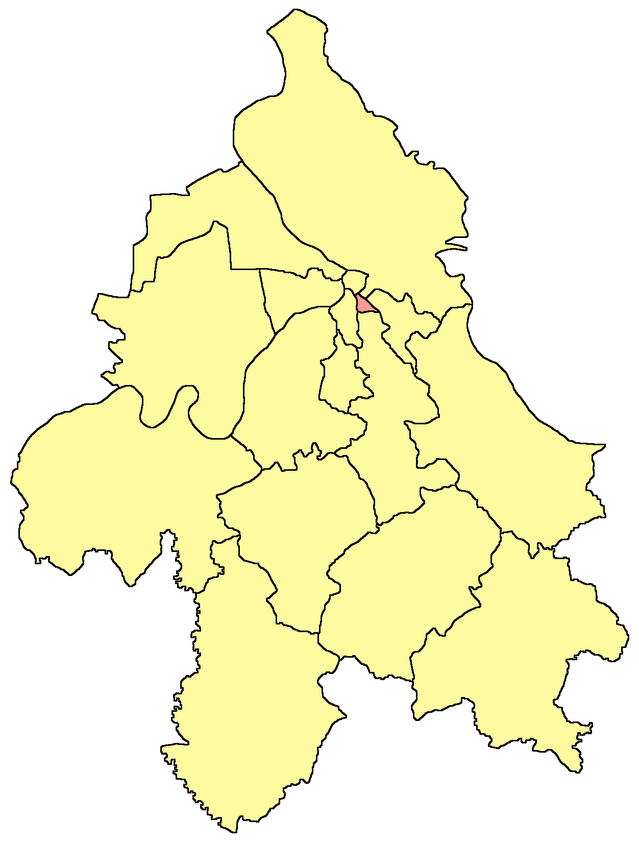 Belgrade municipality map